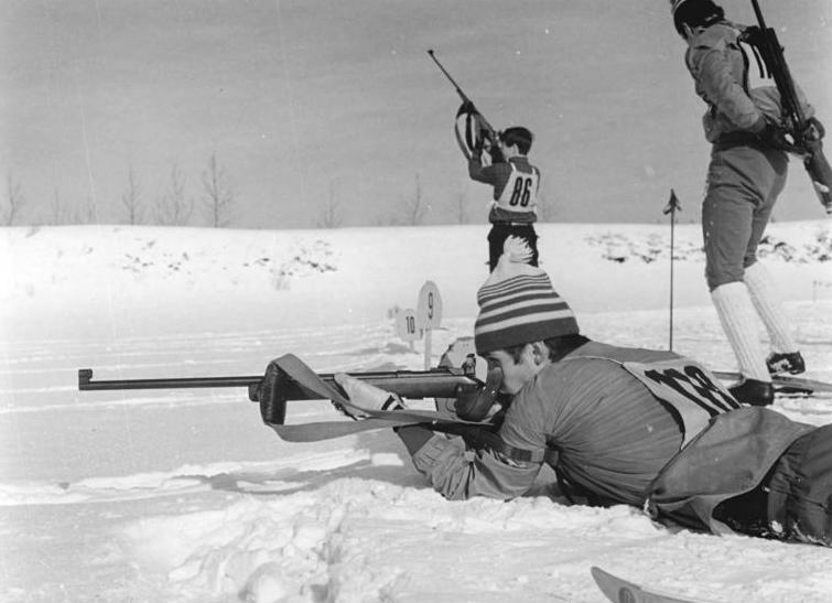 Jörg Müssiggang, Volker Grohmann Zentralbild Häßler 11-2-70 Vorbereitung III. Kinder- und Jugendspartakiade vom 18.-22.2.70 in Johanngeorgenstadt- Im Biathlonstadion von Altenberg nahmen 92 Kinder und Jugendliche die Wettkämpfe (9.2.) zum Anlaß, um sich die begehrteb Fahrkarten für die bevorstehende Spartakiade zu sichern. Am Schießstand versuchen Jörg müssiggang (vorn, EOS Altenberg) und Volker Grohmann (OSK Kipsdorf) möglichst viele Treffer ins Ziel zu bringen.